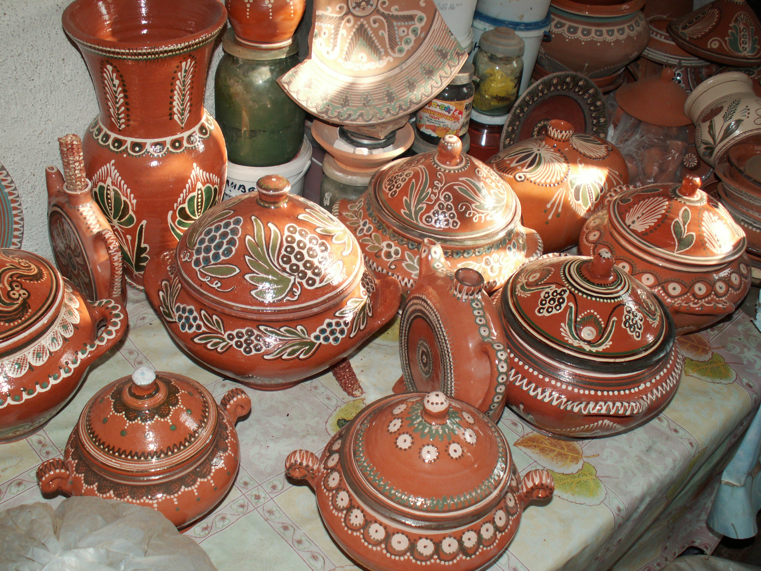 Bubnivka Ceramics 2 Ukraine